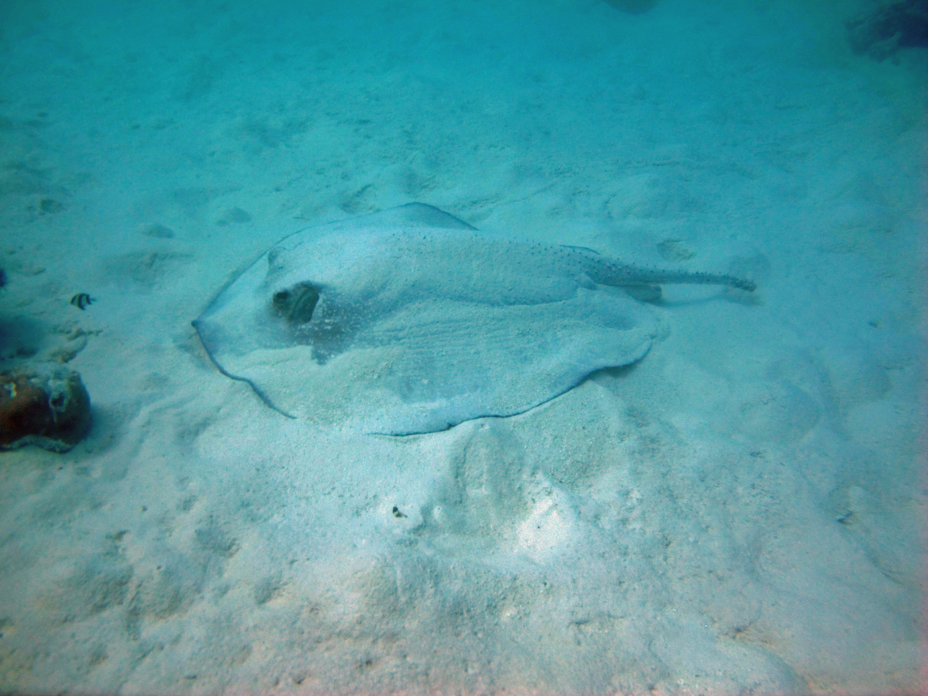 Une raie porc-épic (Urogymnus asperrimus) à Voavah, aux Maldives (atoll de Baa).